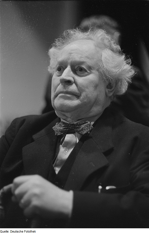 Original image description from the Deutsche Fotothek Martin Andersen-Nexö